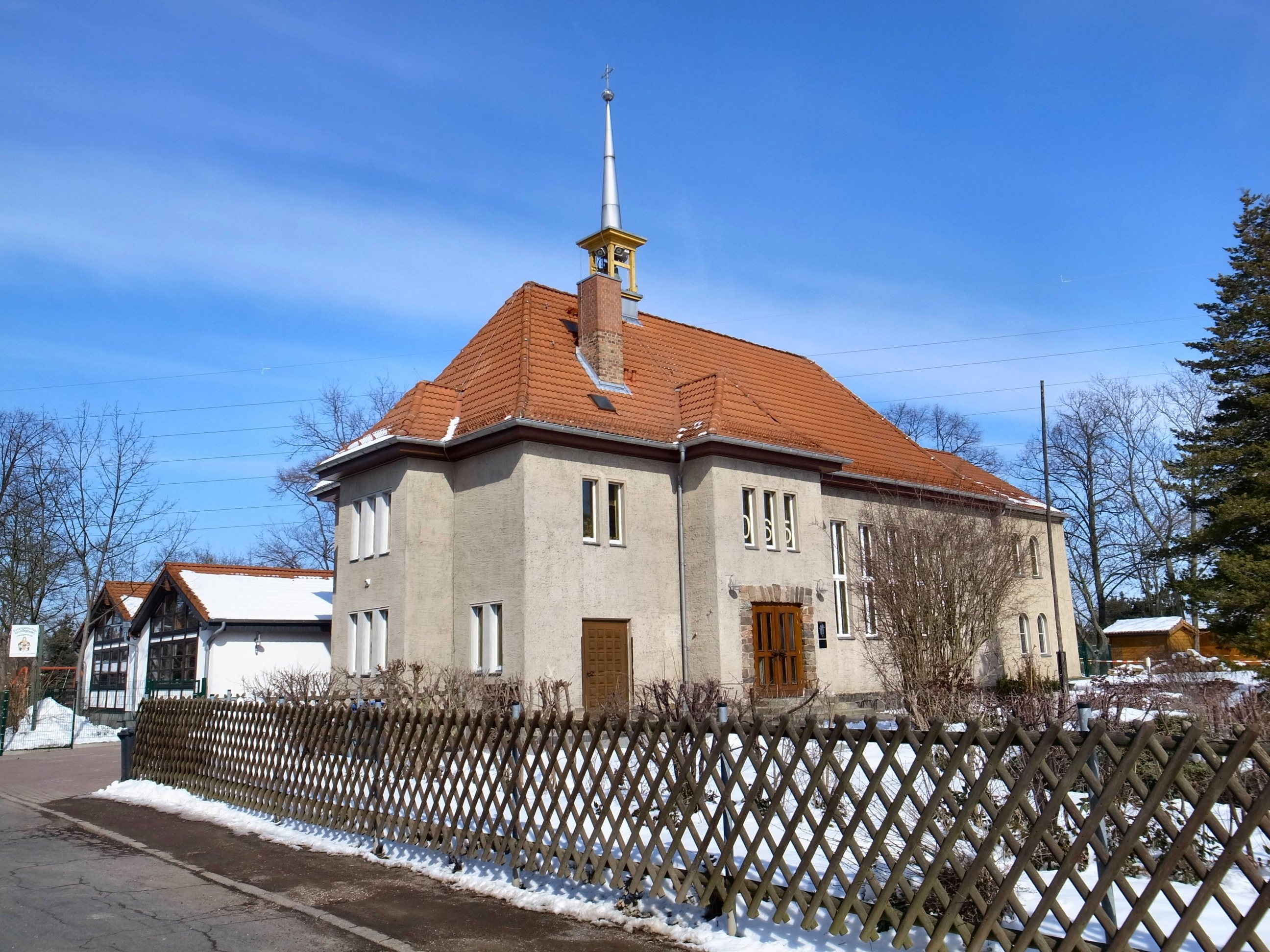 Kreuzkirche Dessau Süd, 65 Tage vor der 80 Jahr Feier (Einweihung 28.05.1933)